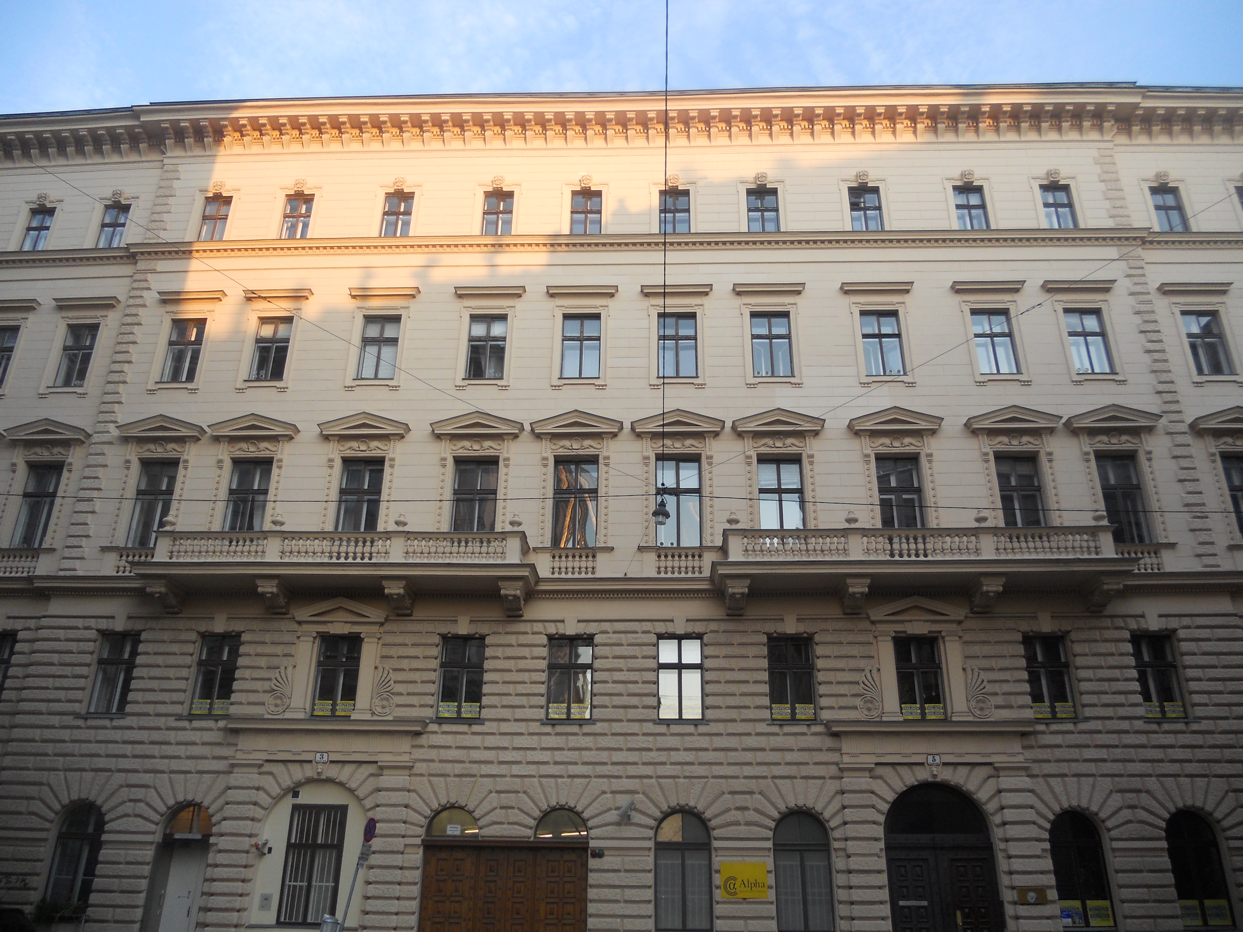 Miethaus Canovagasse 3-5 in Wien